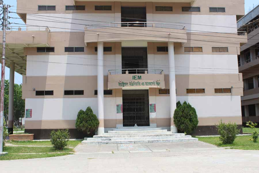 Front of view Industrial Engineering and Management Department of KUET